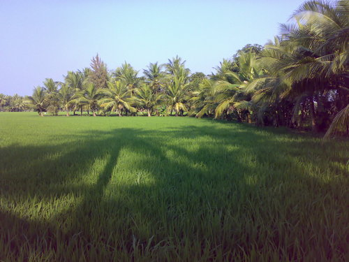 T.Kothapalli Village